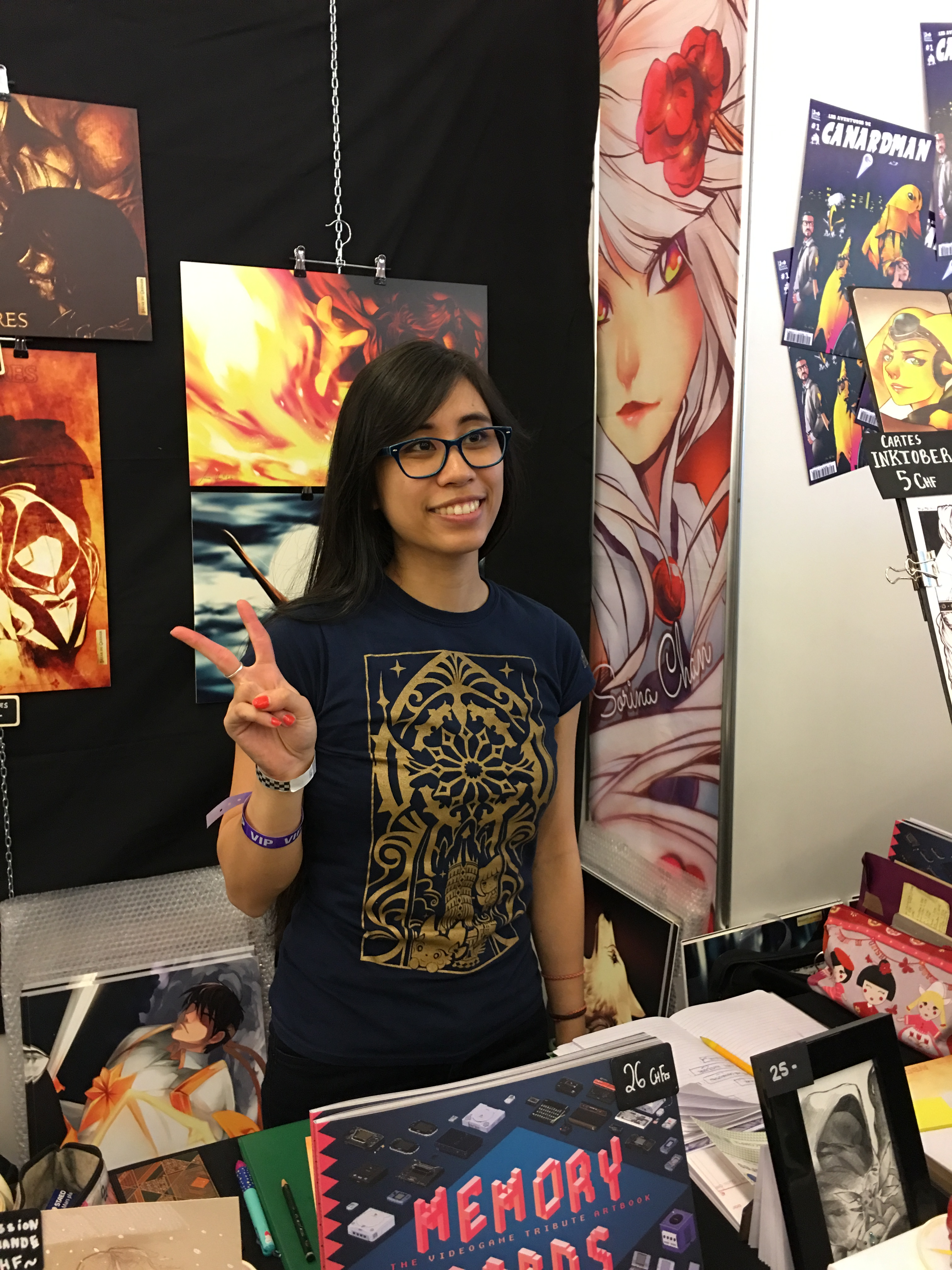 Sorina Chan illustrator and graphic artistduring Polymanga 2017 in Montreux, switzerland